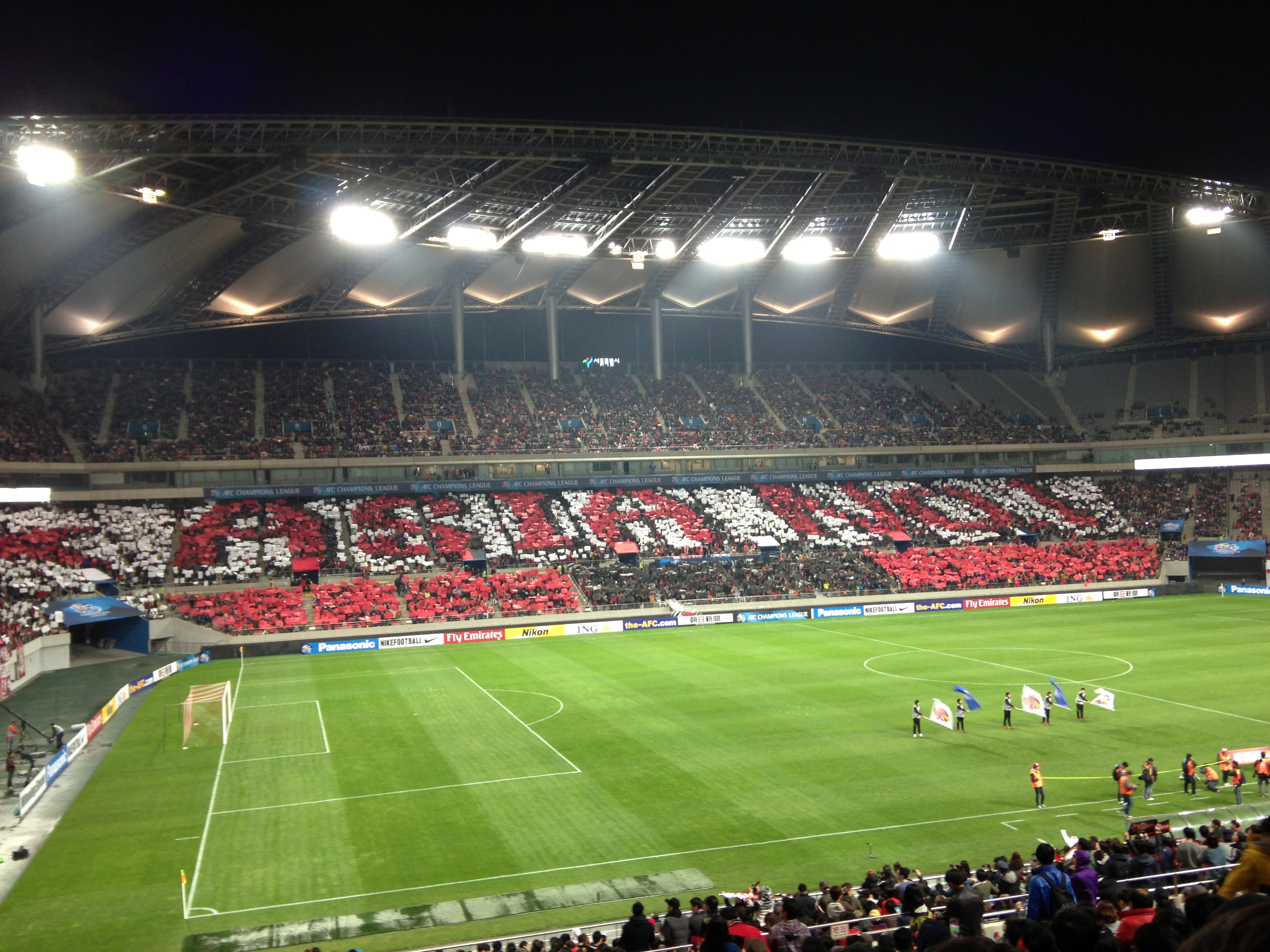 결전의 밤 - 본사진은 CC Photo&share 캠페인 을 통해서 무인양품님께서 (by 무인양품) 공유한 사진입니다. CCL조건만 지키시면 사진을 자유롭게 이용하실 수 있습니다.